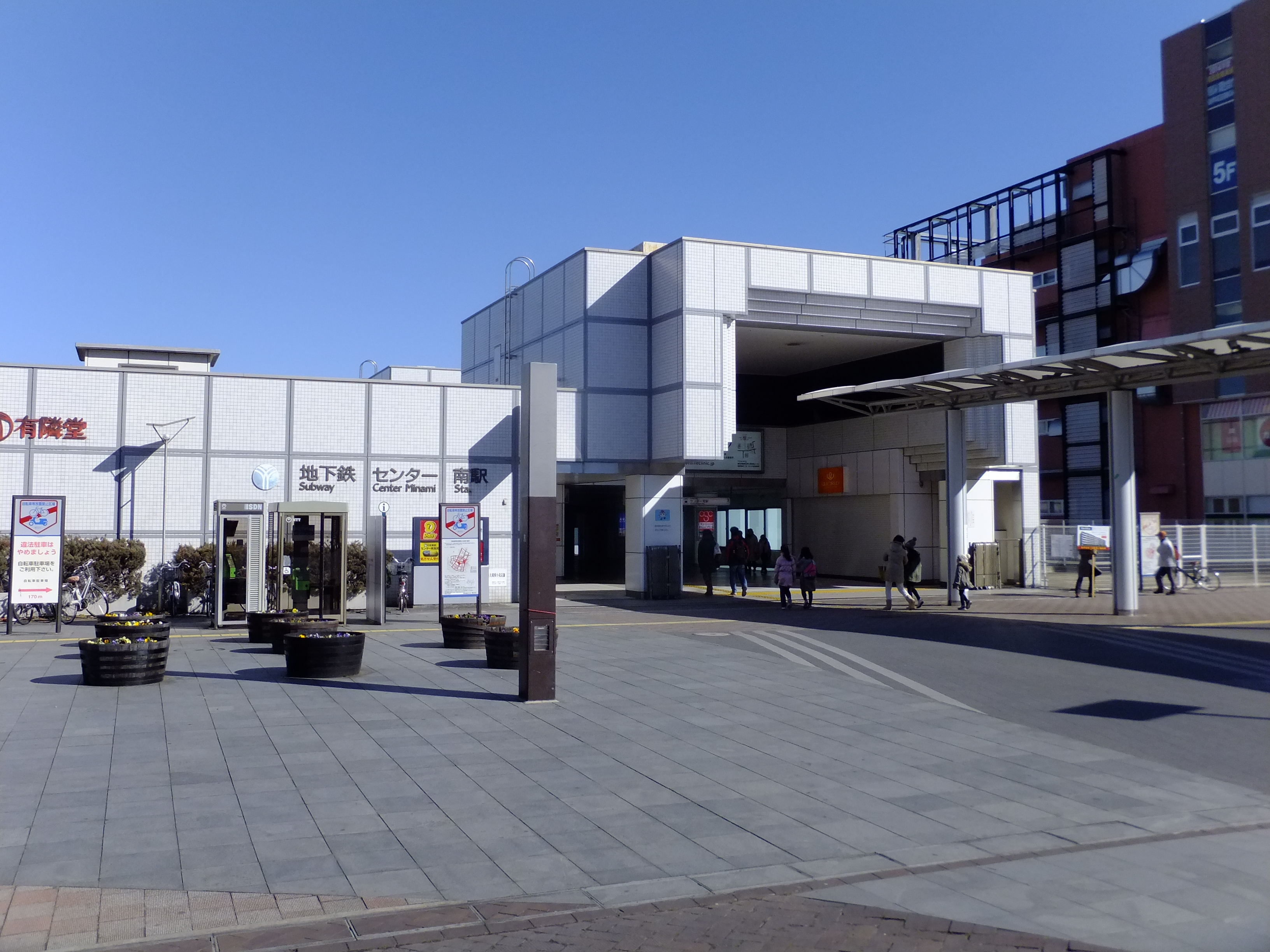 横浜市営地下鉄・センター南駅